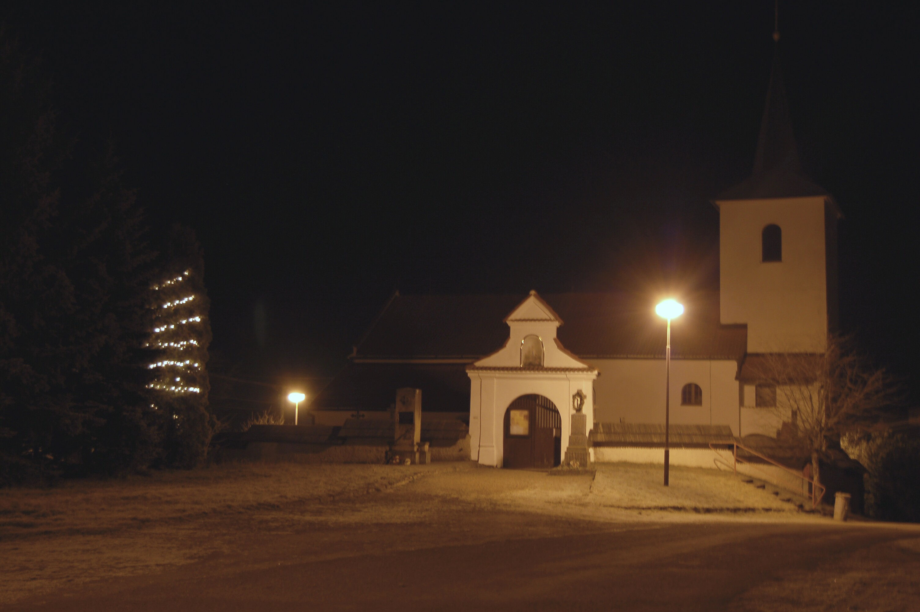 Bory, kostel